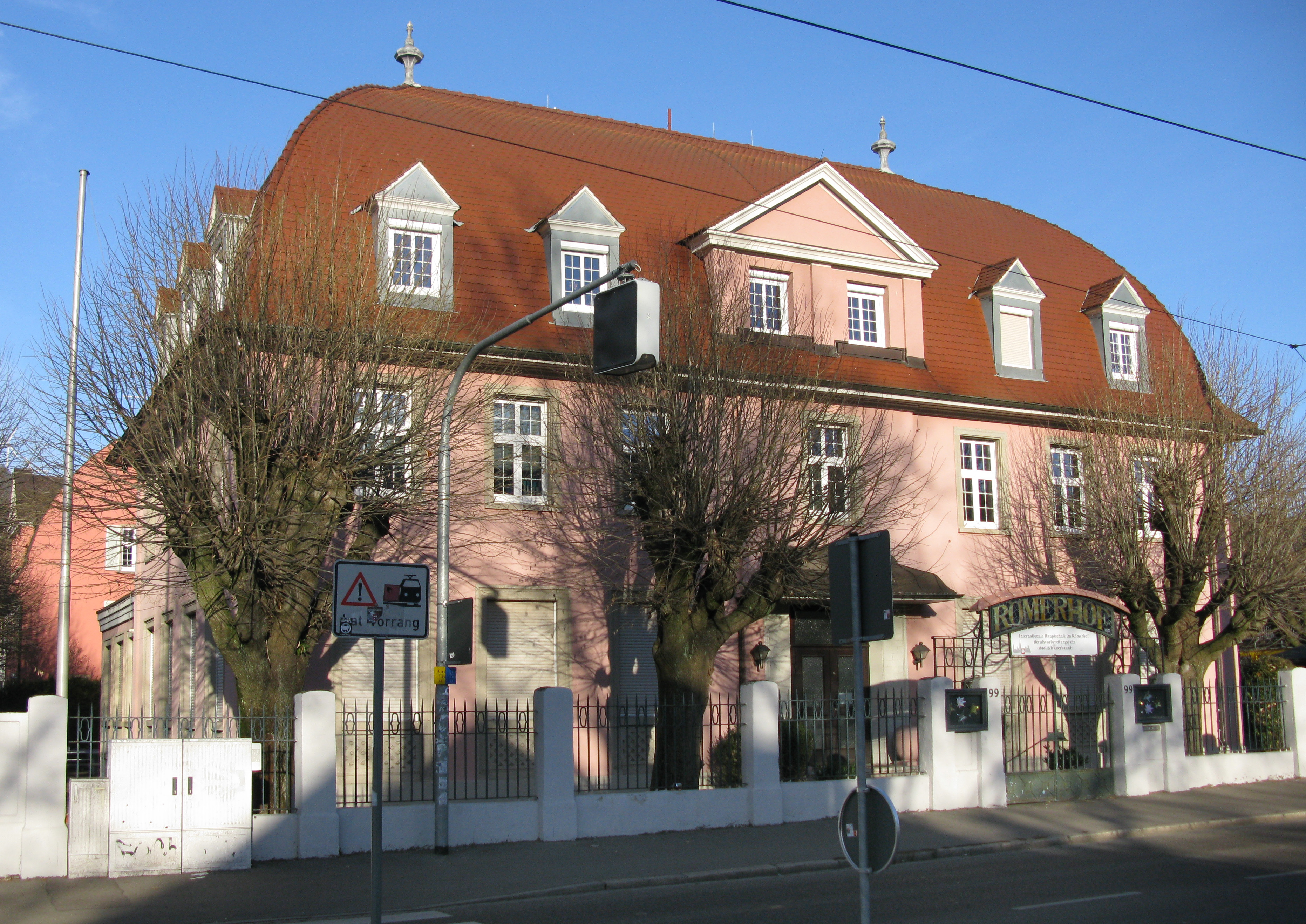 "Römerhof" in Freiburg-Waldsee